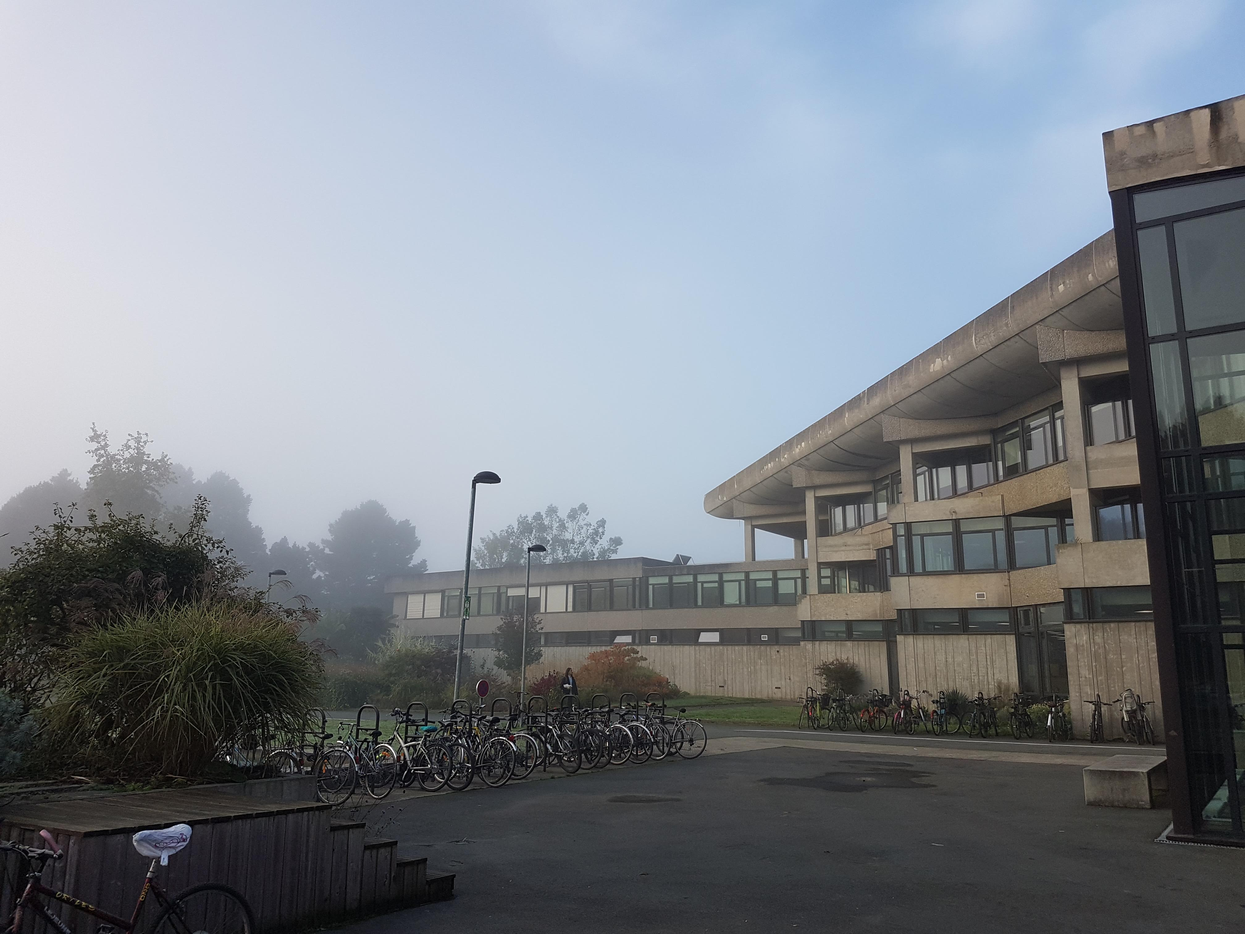 Photo de l'école depuis le côté gauche